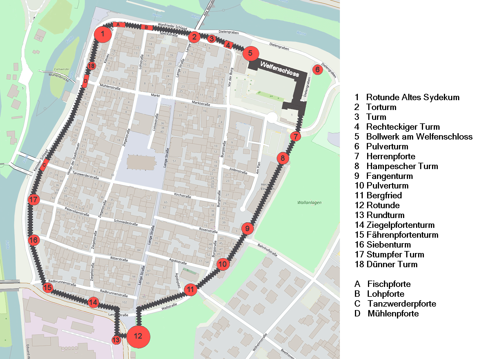 Stadtbefestigung Münden auf Grundlage einer aktuellen Karte mit Einzeichnung der mittelalterlichen Anlagen wie Stadtmauer, Türme und Pforten, zum Teil nicht mehr vorhanden oder verändert